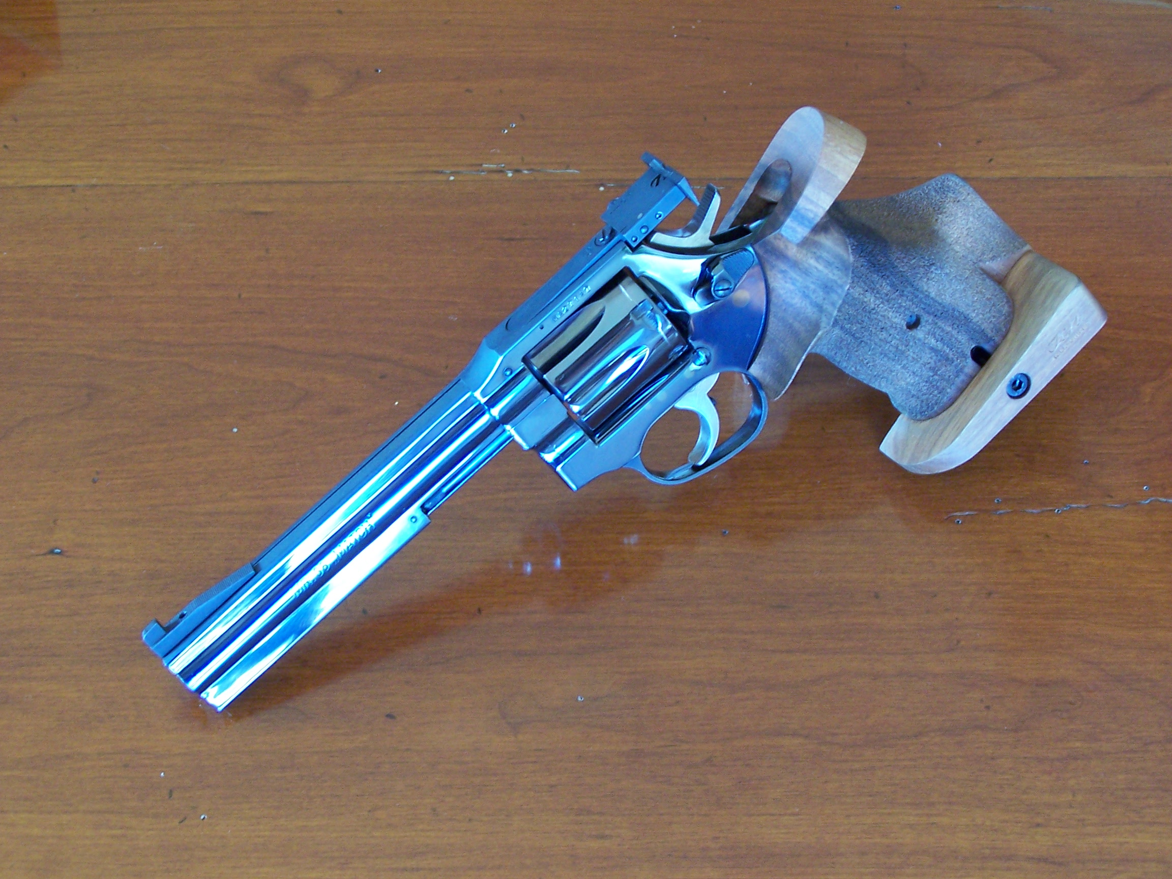 Revolver de Match type Manurhin MR-73 modèle MR-38 MATCH, équipé d'une crosse anatomique UIT/ISSF Karl Nill. Calibre .38 Special, numéro de série MA27147.